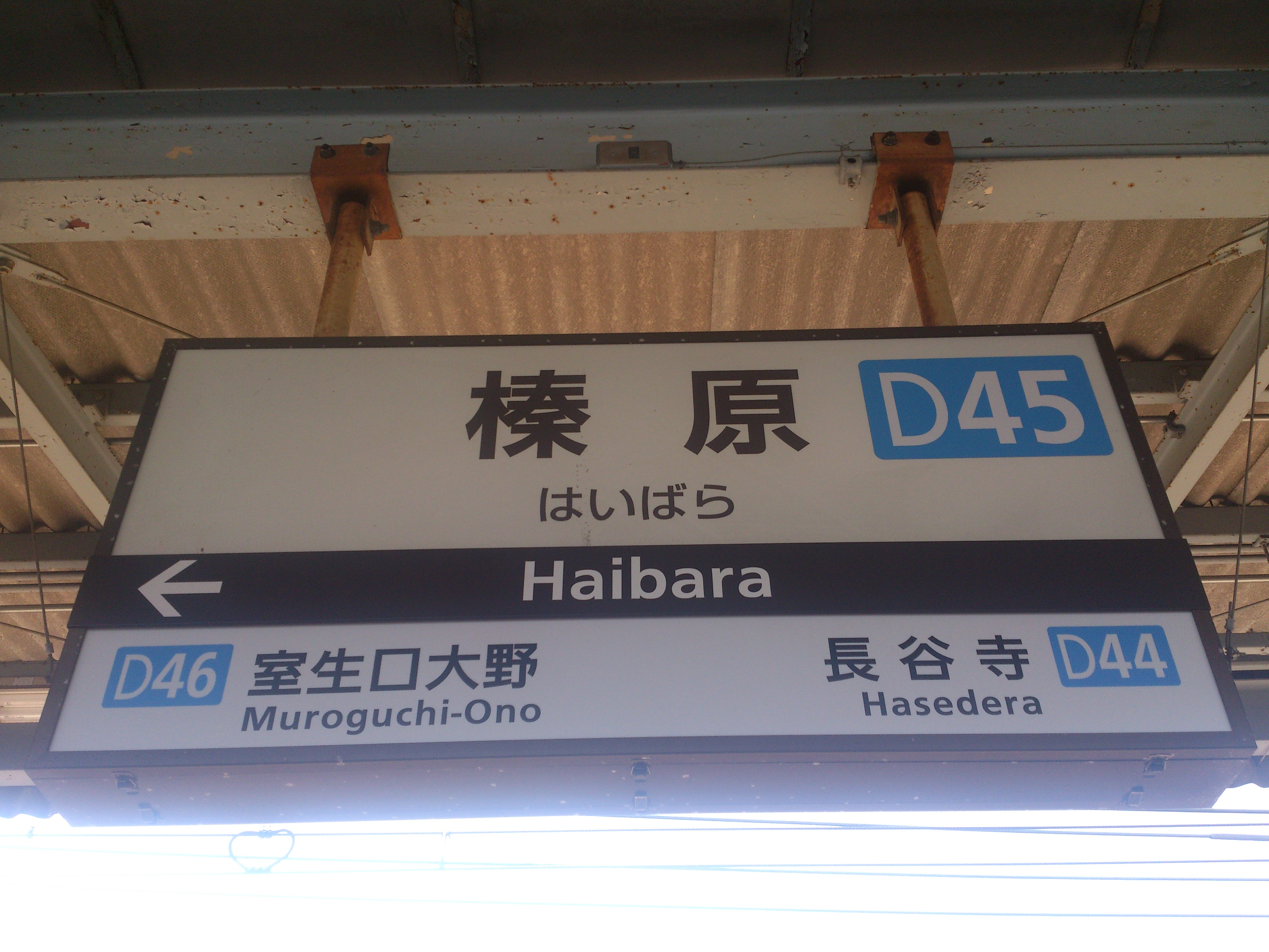 榛原駅にて撮影